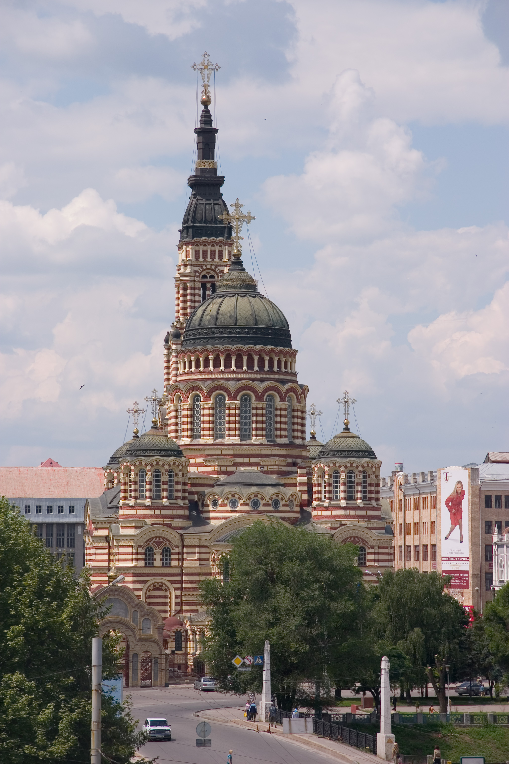 Blagoveschensky church in Kharkov Благовещеский кафедральный собор в Харькове. Ул. Энгельса, 12. Архитектор М.И. Ловцов. 1898-1901. Вид со стороны спуска Халтурина.